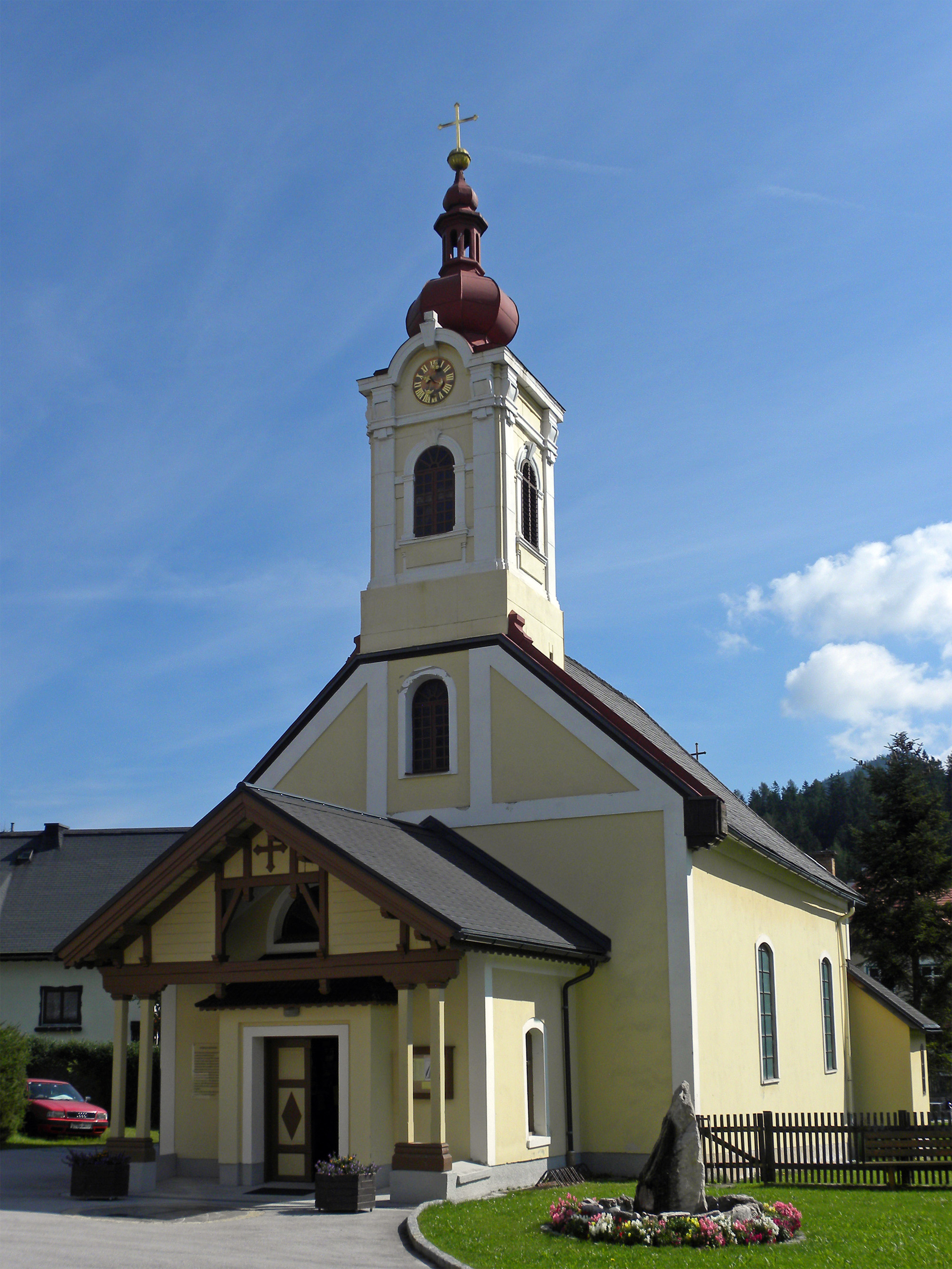 Evang. Pfarrkirche A.B.